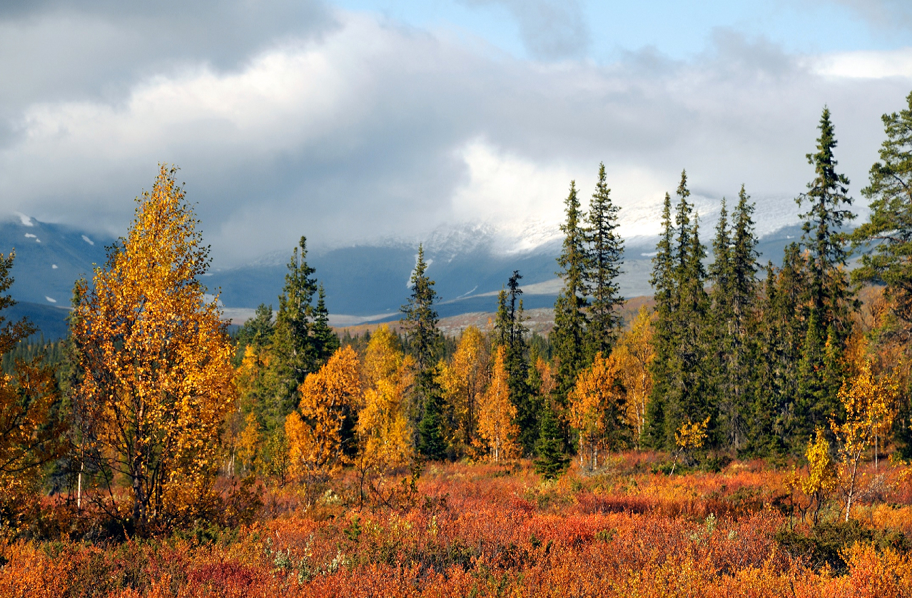 Lokalität / Fundort Sarek nationalpark, Sweden, with Picea abies, Betula pendula. Die Genehmigung von biopix.dk liegt mir per email von Niels Sloth vom 12.05.2013 vor zudem aus den AGB von biopix.dk: […] Zur freien Verwendung Die Fotos können normalerweise für nicht-kommerzielle Vorhaben kostenlos genutzt werden, wenn von uns eine schriftliche Genehmigung erteilt wurde. Die kostenfreie Nutzung bezieht sich nur auf Fotos, die direkt von biopix.dk gestellt wurden. […]